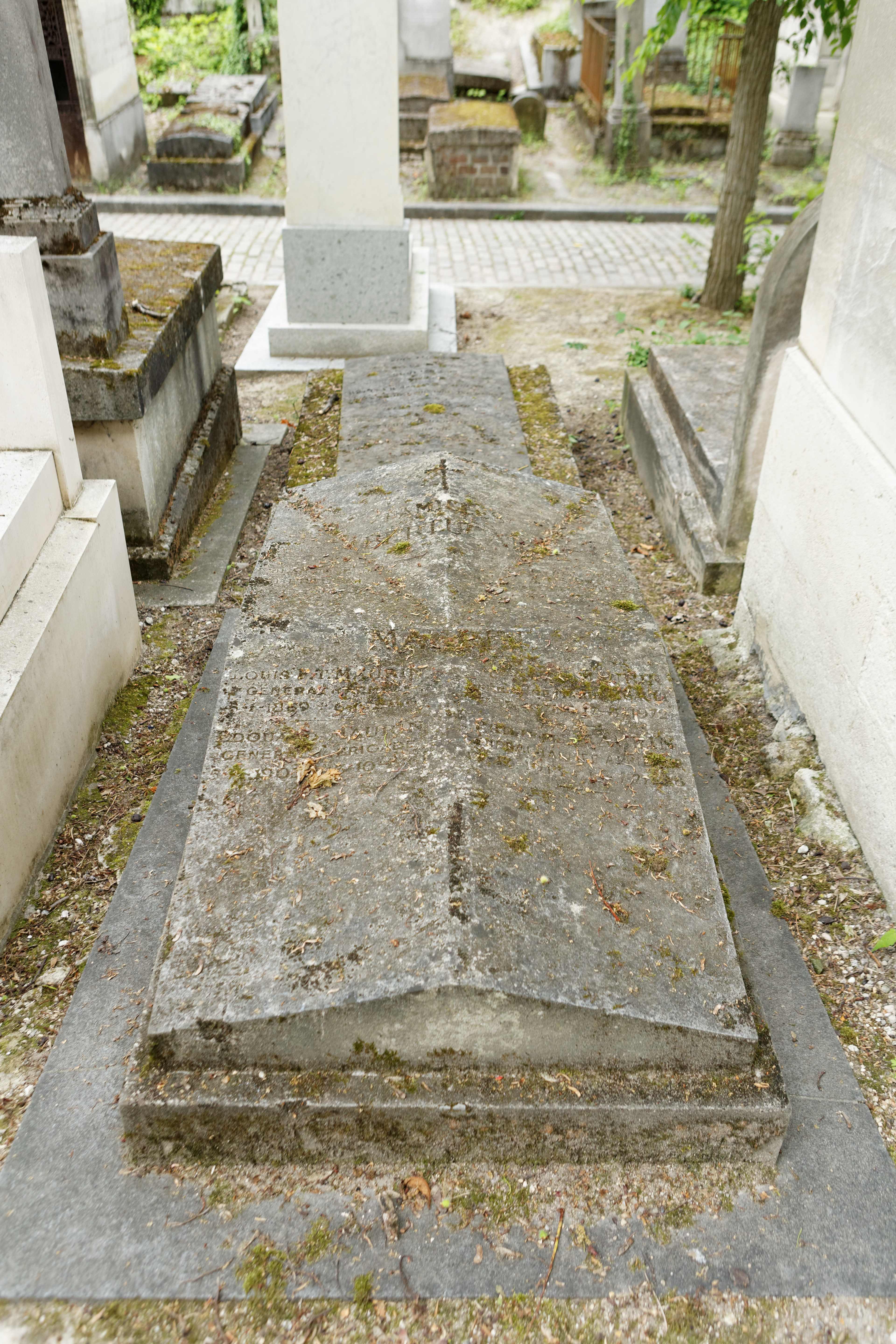 Sépulture de Jean-Joseph Bertucat (1762-1844) ; Rosalie Musnier (1777-1855), son épouse ; Louis Maurin (1869-1956), général et ministre ; Édouard Maurin (1903-1961), fils de Louis Maurin ; Philippe Maurin (1913-2008), fils de Louis Maurin, général d'aviation et grand croix de la Légion d'honneur.